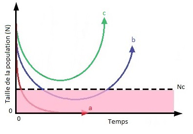 Graphique représentant le modèle de Gomulkiewicz et Holt (1995).